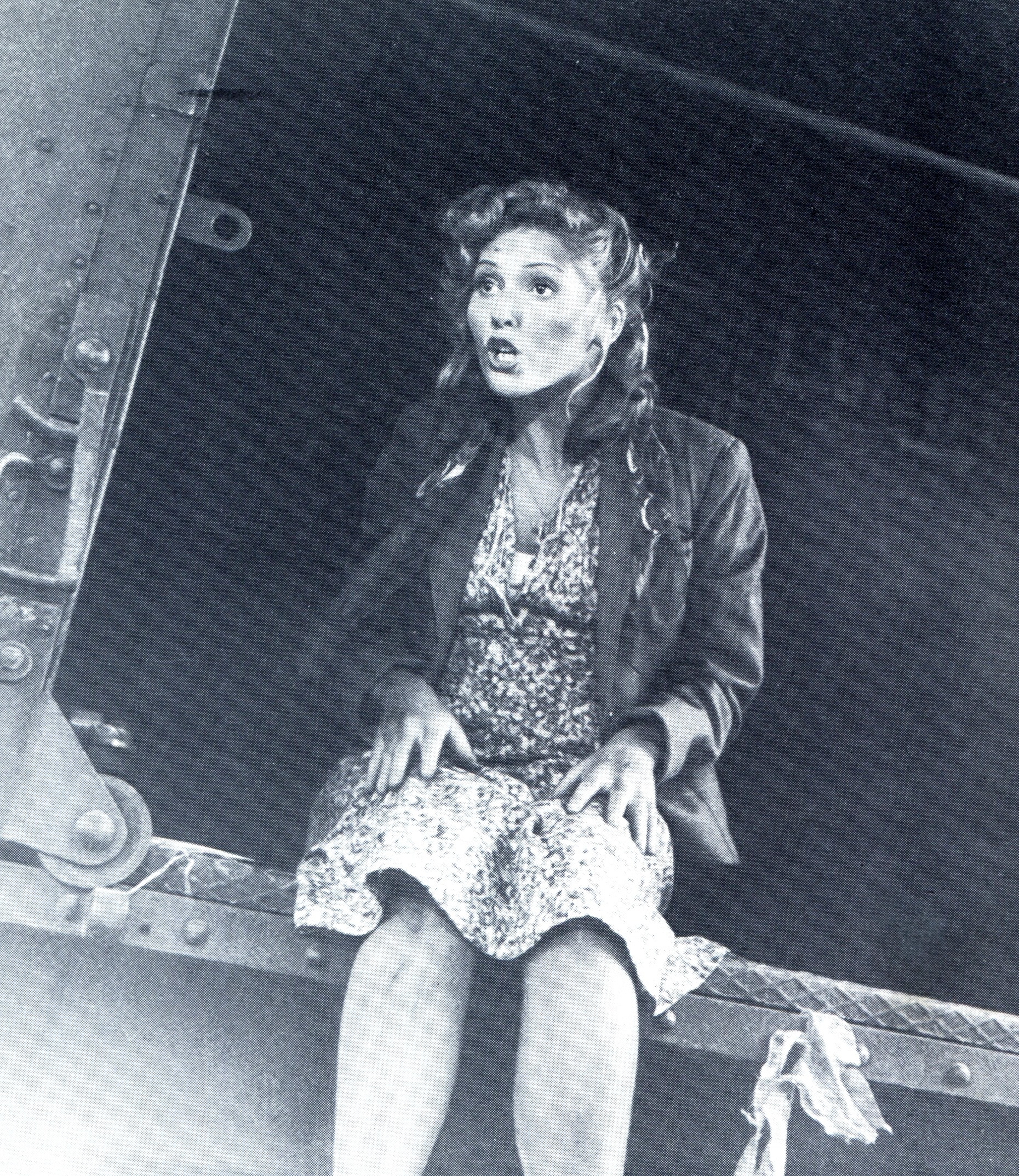 Carla Del Poggio in una scena iniziale di "Senza pietà" (Lattuada, 1948)